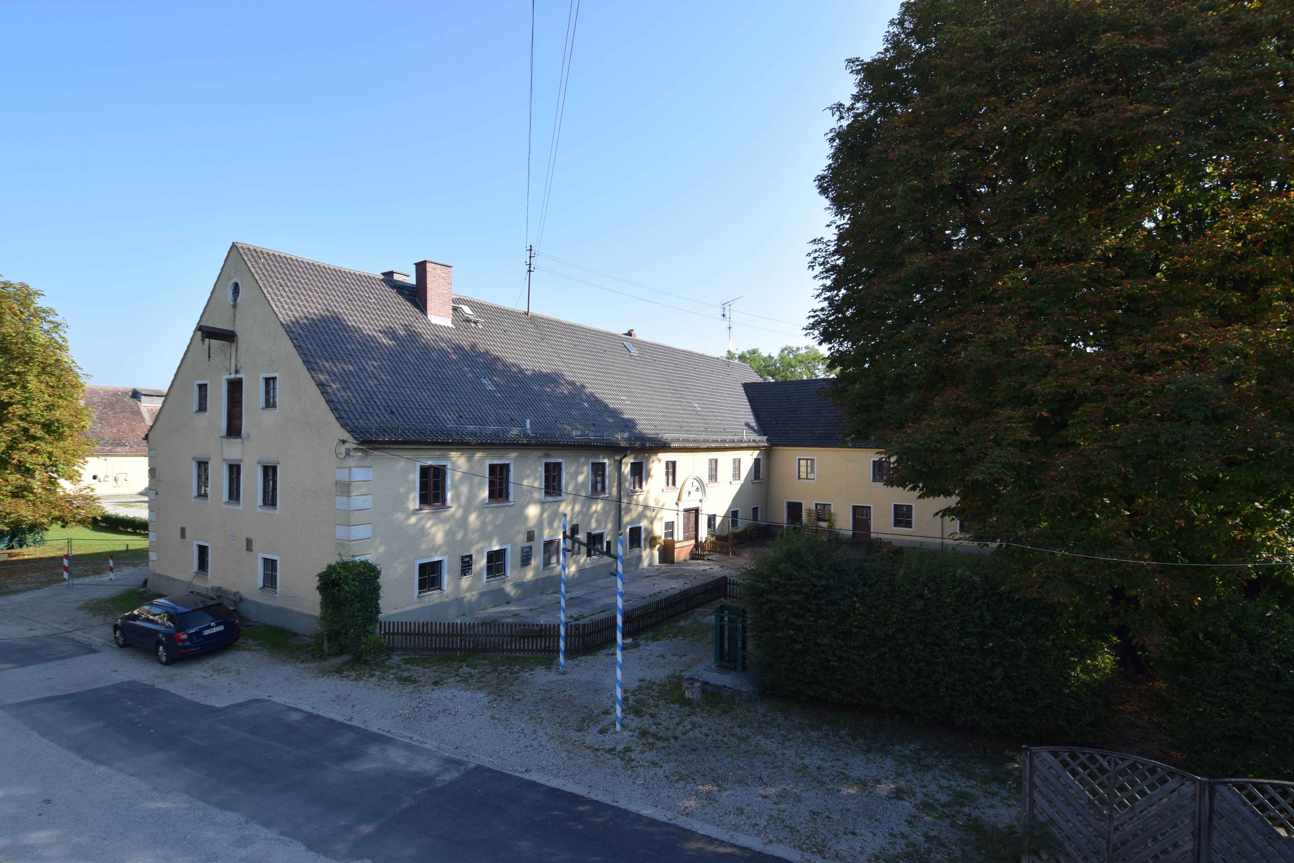 Ehem. Gutshaus / spätere Schlosswirtschaft in Gut Freiham